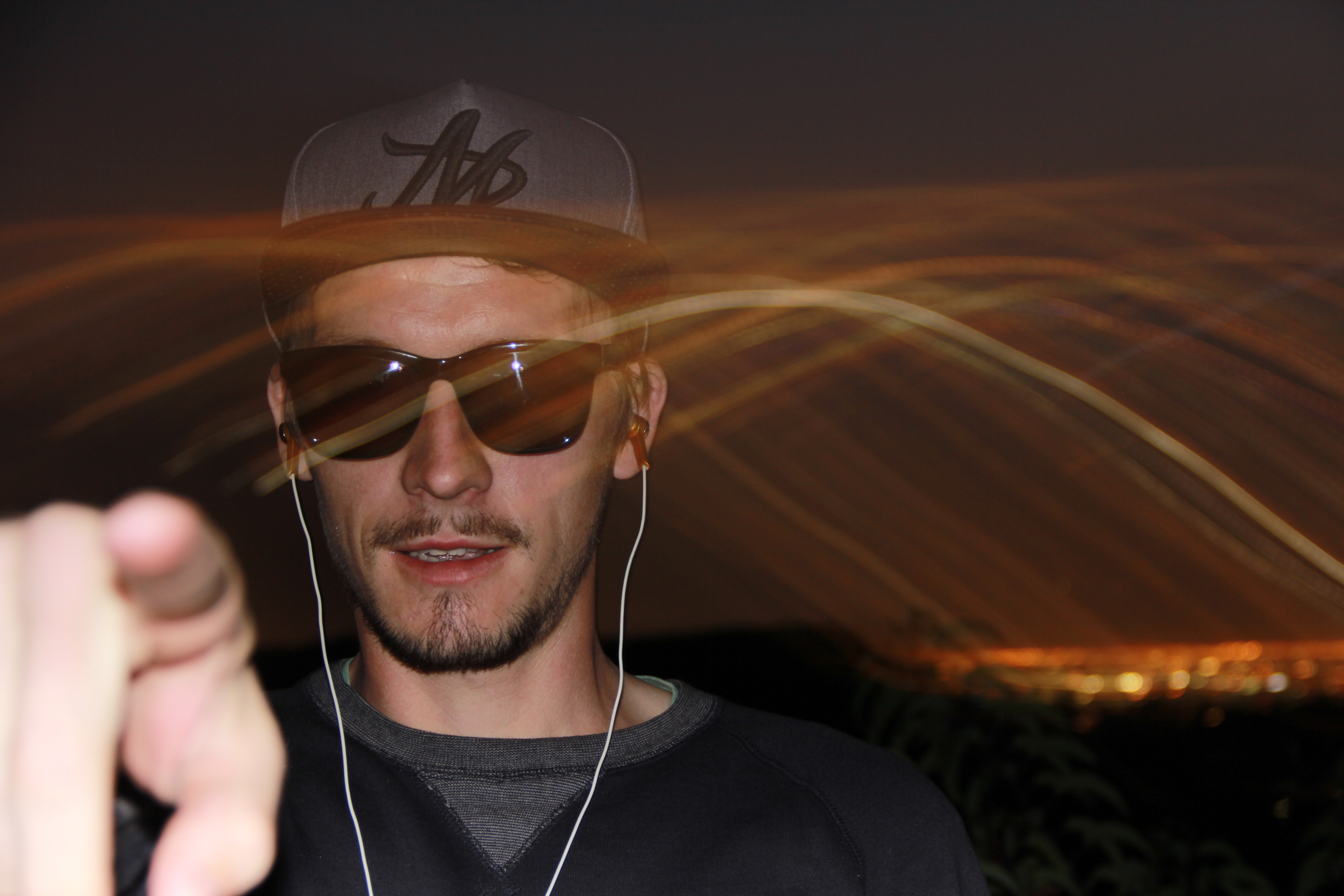 Tomas Vintr, Skateboardista, Los Angeles